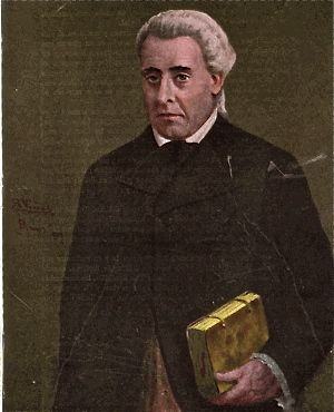 Retrat a l'oli d'Andreu de Bofarull